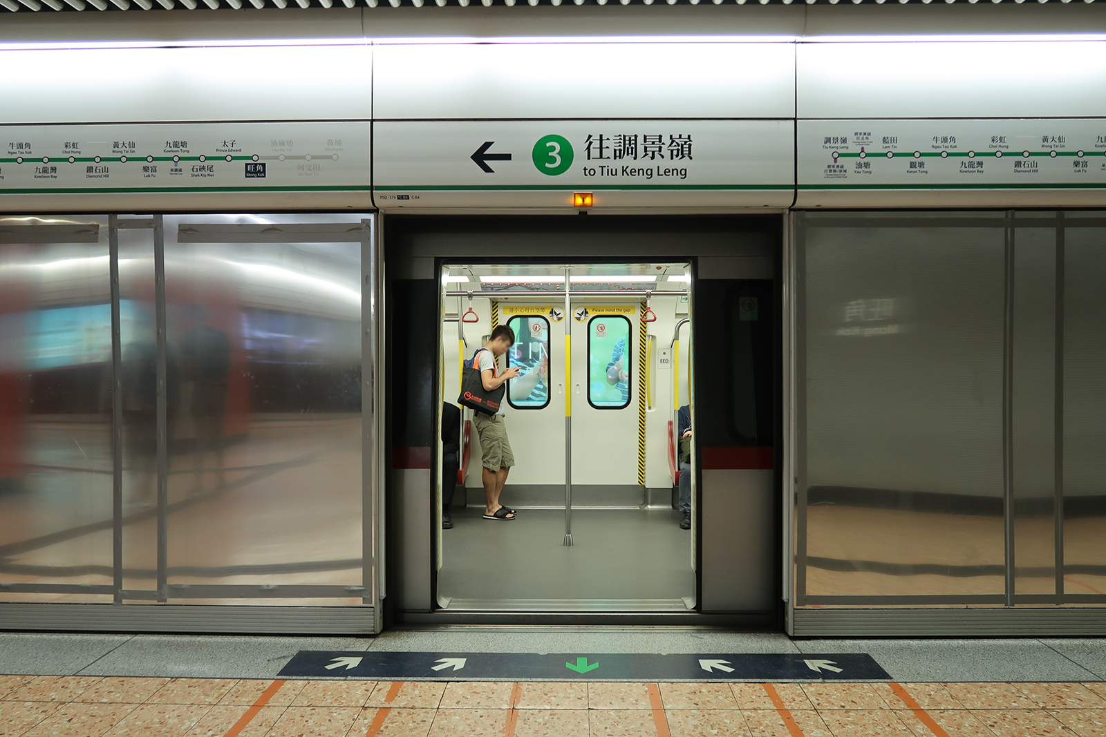 旺角站觀塘綫往調景嶺方向的月台裝上了鋼板